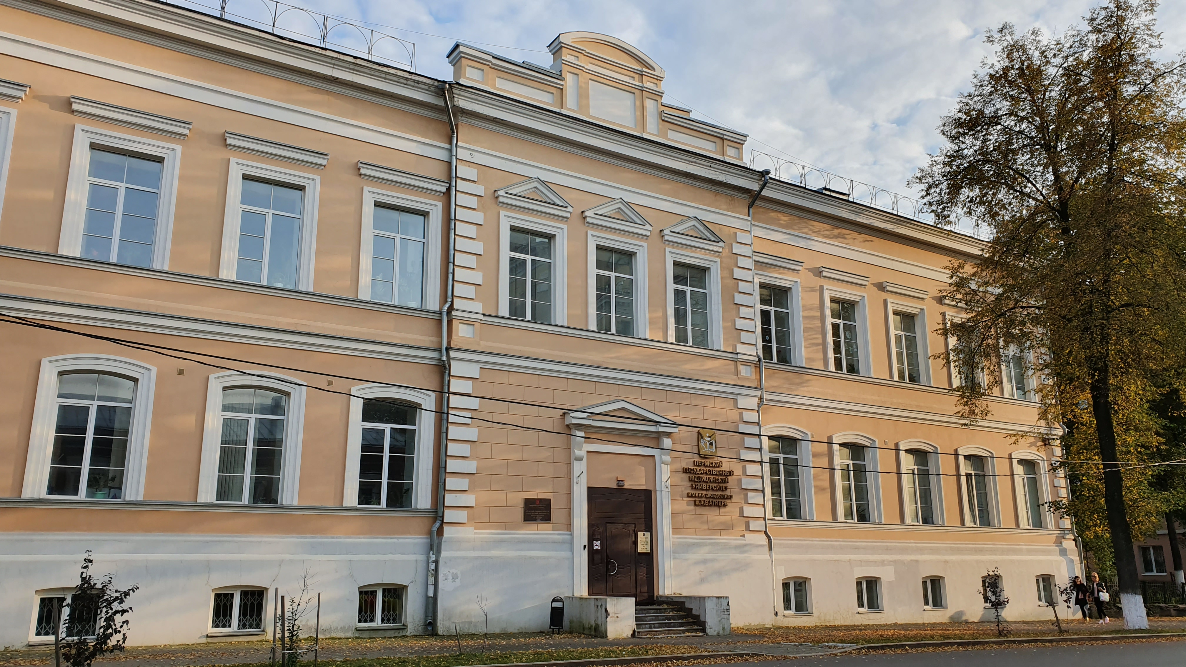 Здание административного корпуса ПГМУ им. ак. Е.А.Вагнера. Бежевое 2-этажное здание с светло-серым фундаментов и подвальными помещениями.